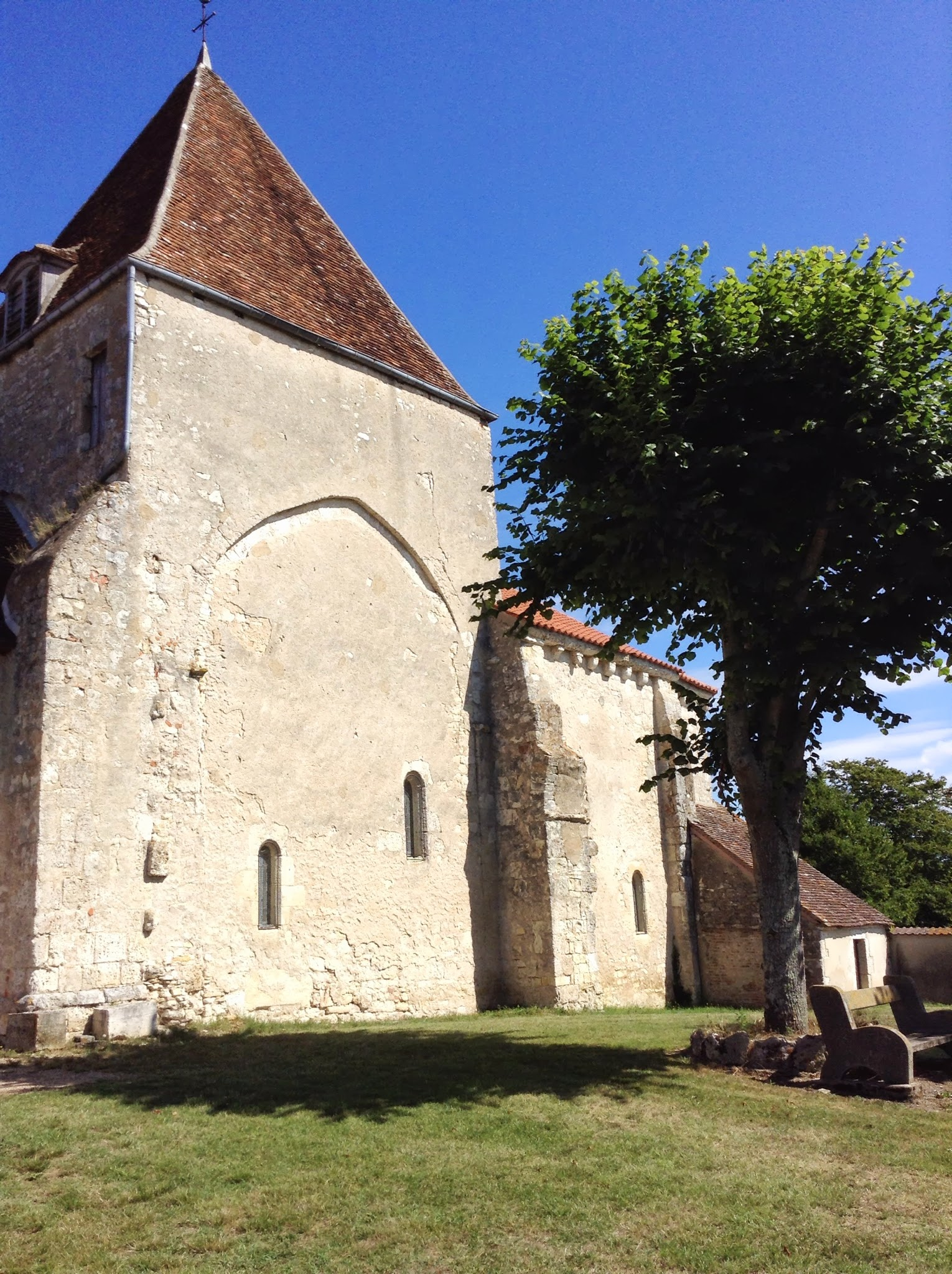 Église Saint-Martin de Corquoy (Cher)